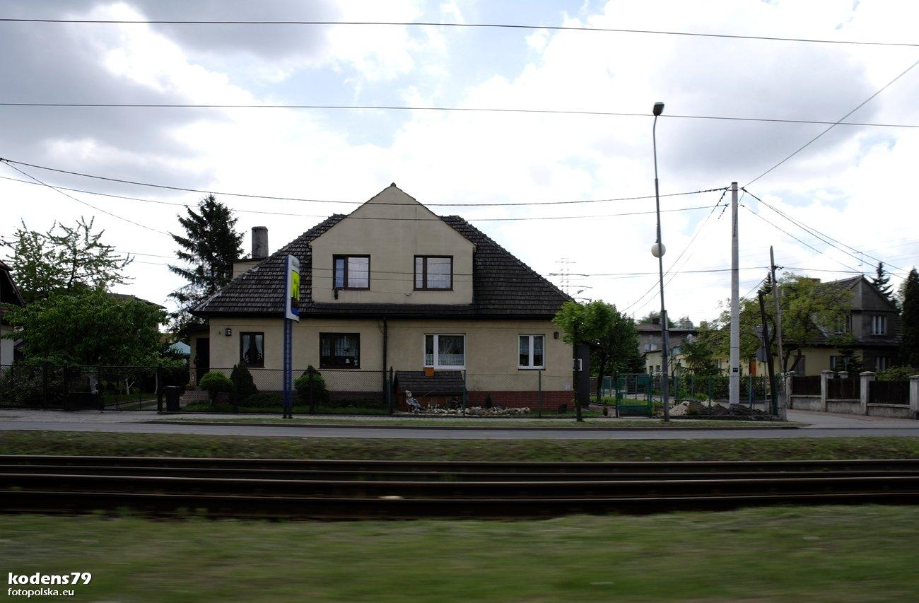 Gliwicka 298-300